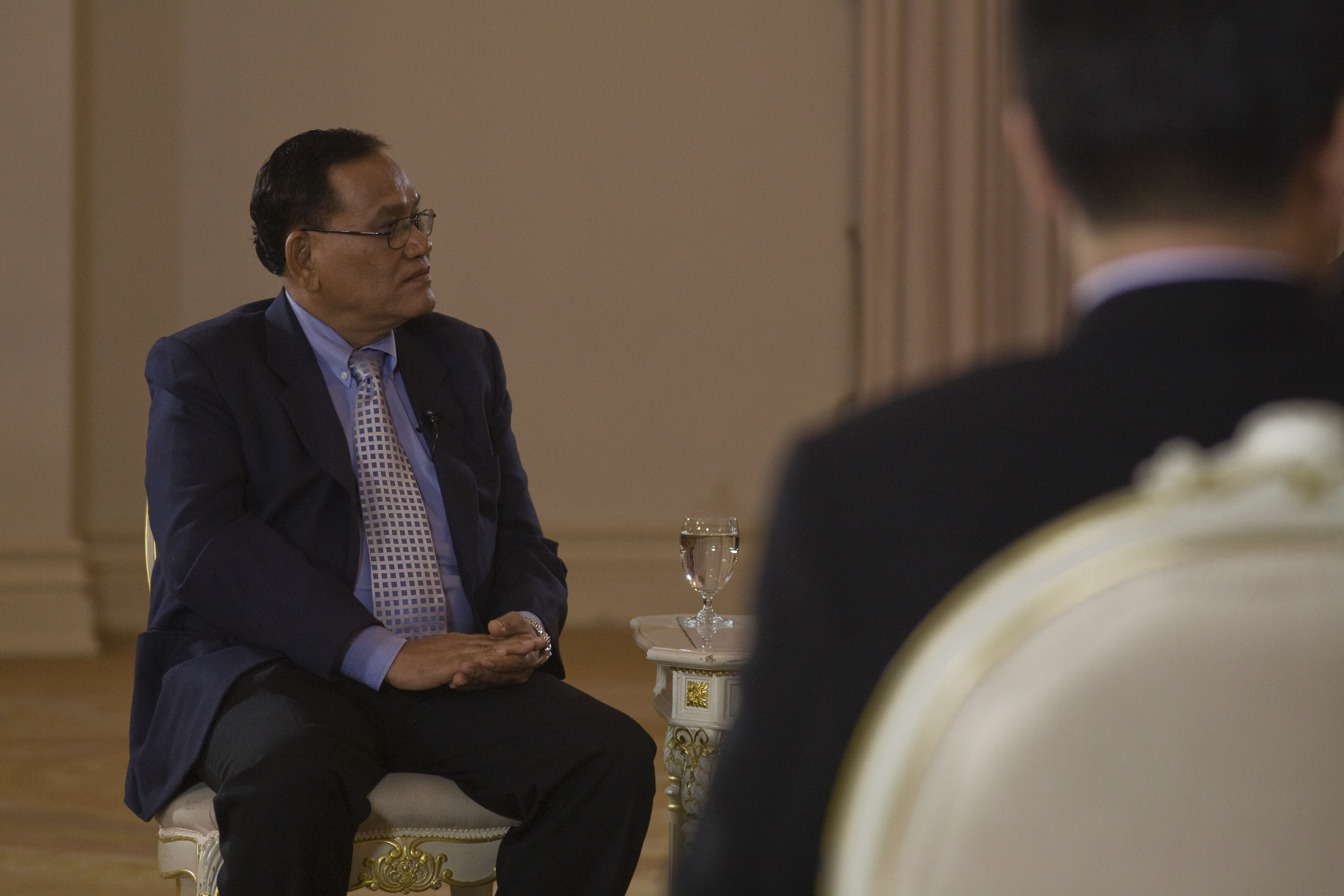 นายกรัฐมนตรีบันทึกเทปรายการเชื่อมั่นประเทศไทยกับนายกฯ อภิสิทธิ์ ณ ตึกสันติไมตรีหลังนอก ทำเนียบรัฐบาล วันเสาร์ ที่ 25 ธันวาคม พ.ศ.2553 (Photographer attached to the Prime Minister of the Kingdom of Thailand : Peerapat Wimolrungkarat / พีรพัฒน์ วิมลรังครัตน์) @is50mm